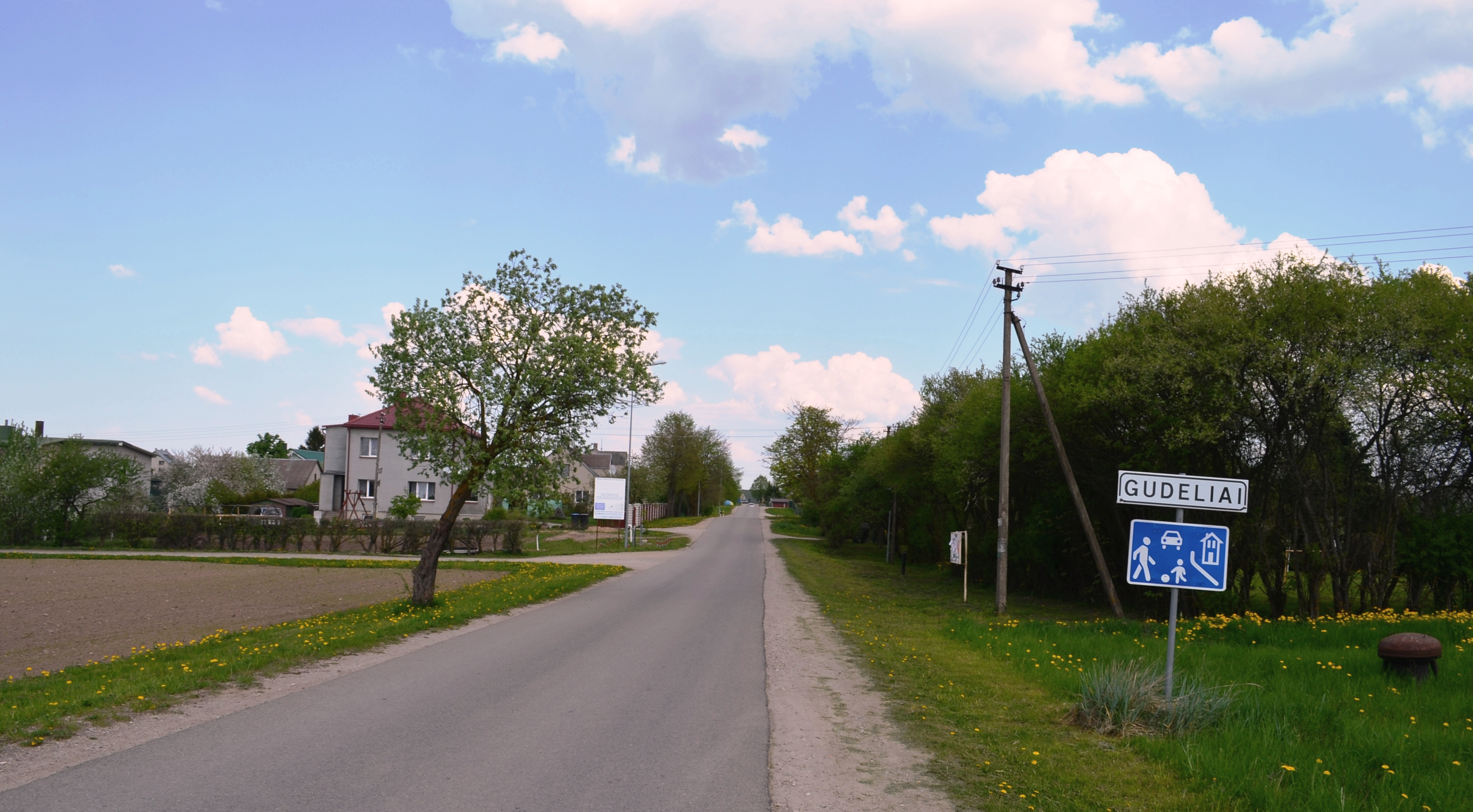 Gudeliai, Maišiagalos sen., Vilniaus raj.